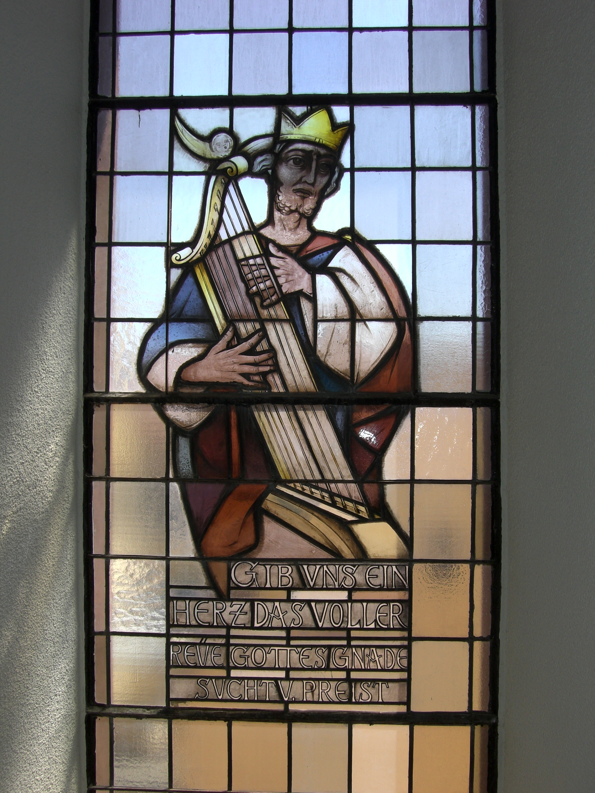 David-Fenster in der Protestantischen Kirche in Römerberg-Mechtersheim